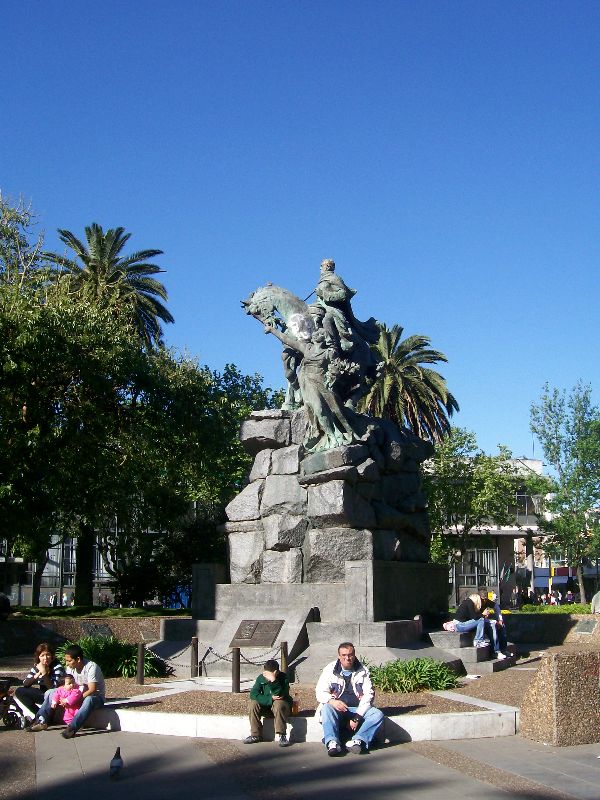 Monumento al Gral San Martín, plaza central de San Martín, prov. de Buenos Aires.